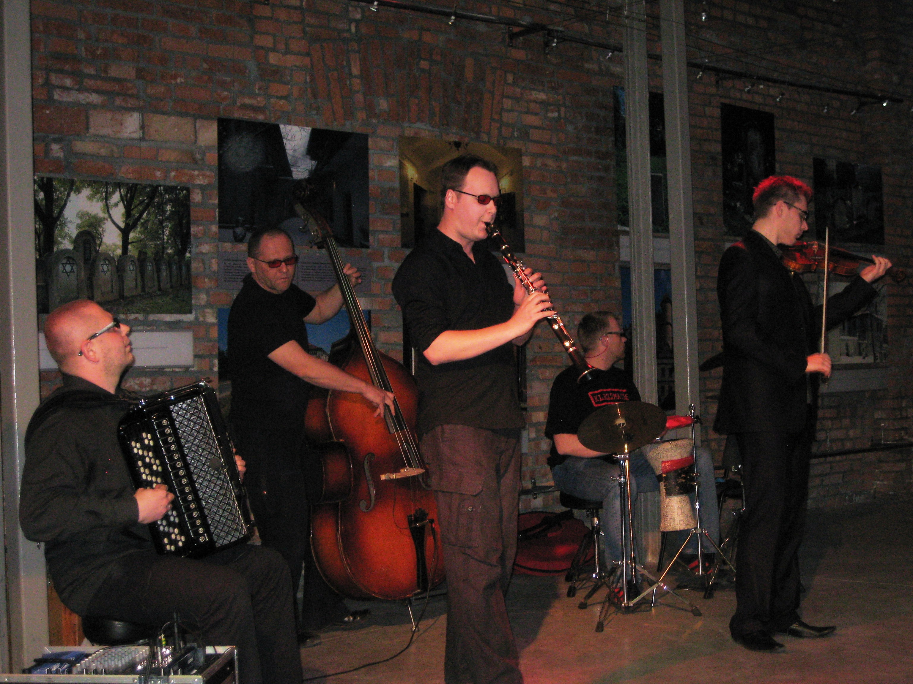 Klezmer Musik im Galicia Jewish Museum in Krakau